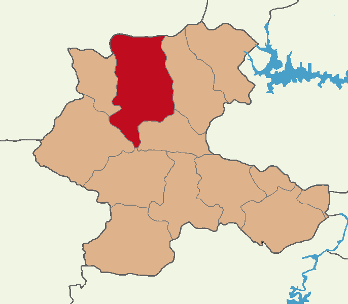 Hekimhan ilçesinin konumu